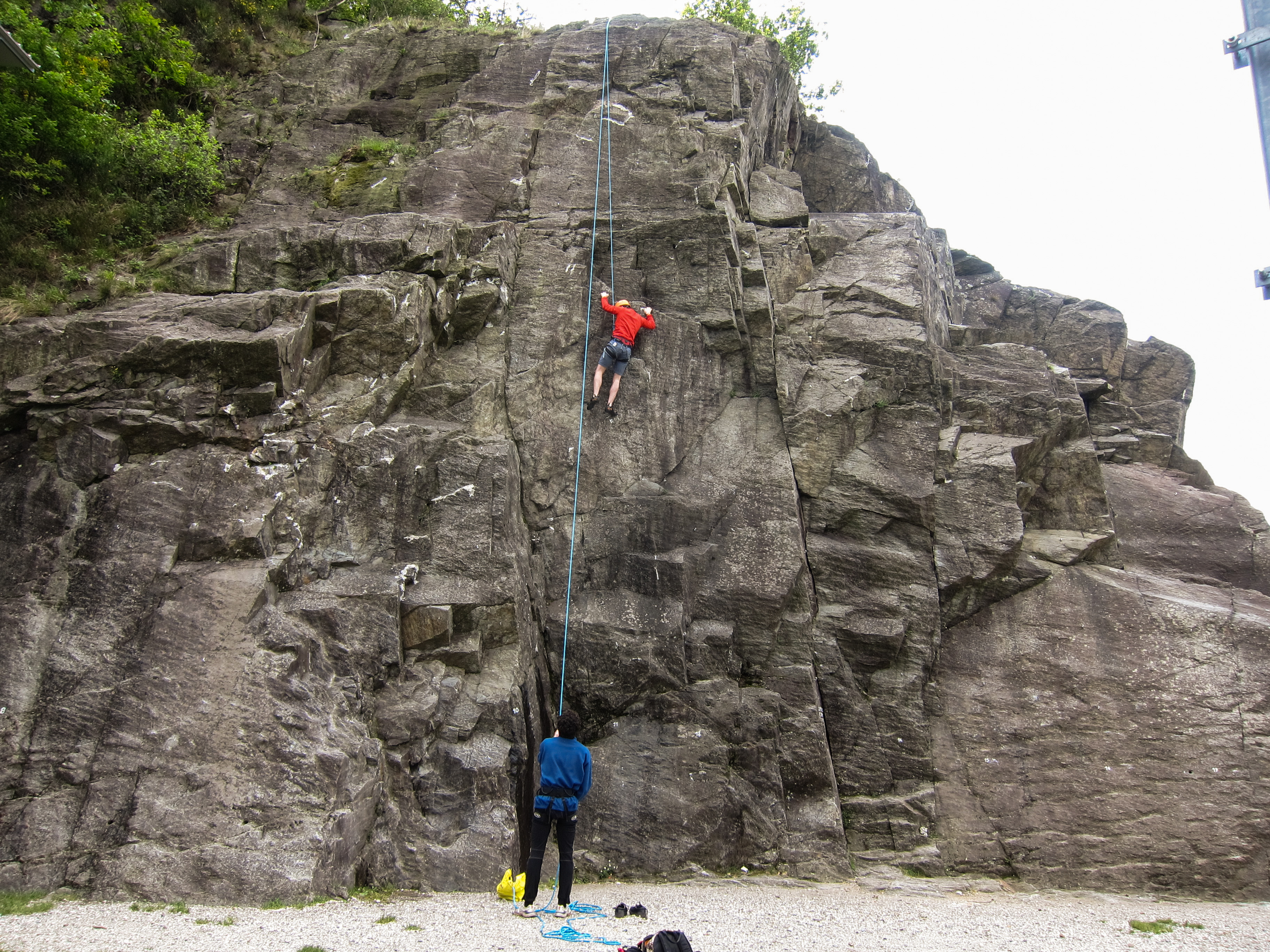 Due arrampicatori praticano arrampicata sportiva alla palestra di roccia "Il Cinzanino" della falesia di Maccagno sulla costa del Lago Maggiore in provincia di Varese. L'uomo in blu fa sicura a quello in rosso che scala la parete di roccia salendo "da secondo", cioè con la corda fissata in cima alla parete. La palestra viene gestita dalla sezione CAI di Luino. Foto scattata il 30 aprile 2017.